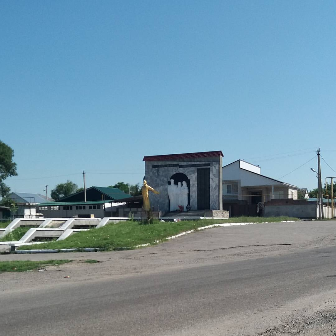 В ауле Эркен-Халк